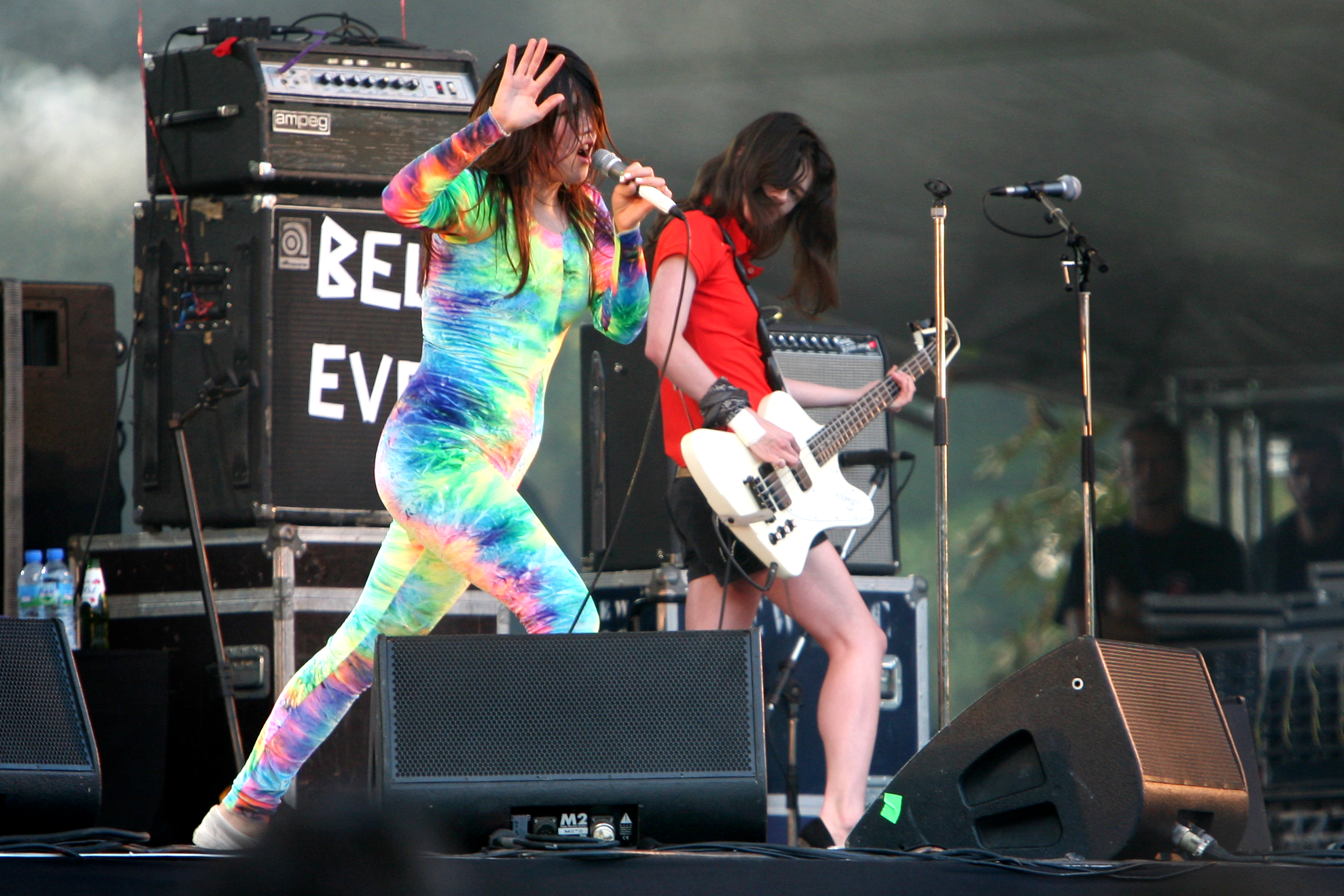 Cansei de Ser Sexy at Rock en Seine, August 2007